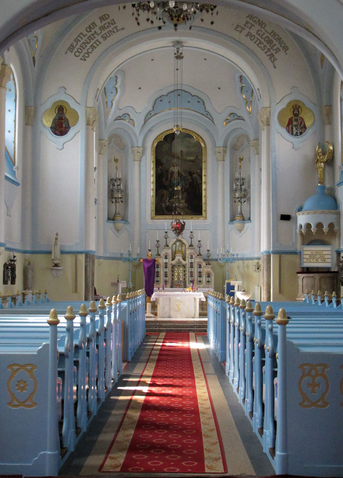 La Iglesia Azul - Bratislava - República Eslovaca Oficialmente conocida como la Iglesia de Santa Isabel de Hungría, pero comúnmente conocida simplemente como "la Iglesia Azul" por razones obvias, esto es lo más atractivo de Bratislava edificio de art nouveau. Su estilo, a veces conocida como la secesión de Hungría, se repite en la escuela primaria cercana en Grosslingova Street. Ambos fueron diseñados por el arquitecto Edmund Lechner Budapest y construido en el siglo XX (la iglesia fue consagrada el 11 de octubre de 1913). Tanto el interior como exterior de la iglesia están pintadas en tonos de azul claro y azul decorada con mayólicas, incluso el techo está decorada con cerámica vidriada azul. La estructura incorpora una torre redonda 36,8 metros. Fuente y más información de Bratislava : visit.bratislava.sk/en/index.asp Blog de Bratislava : .es/ Ver el videofotos de Bratislava aquí : Fotografías